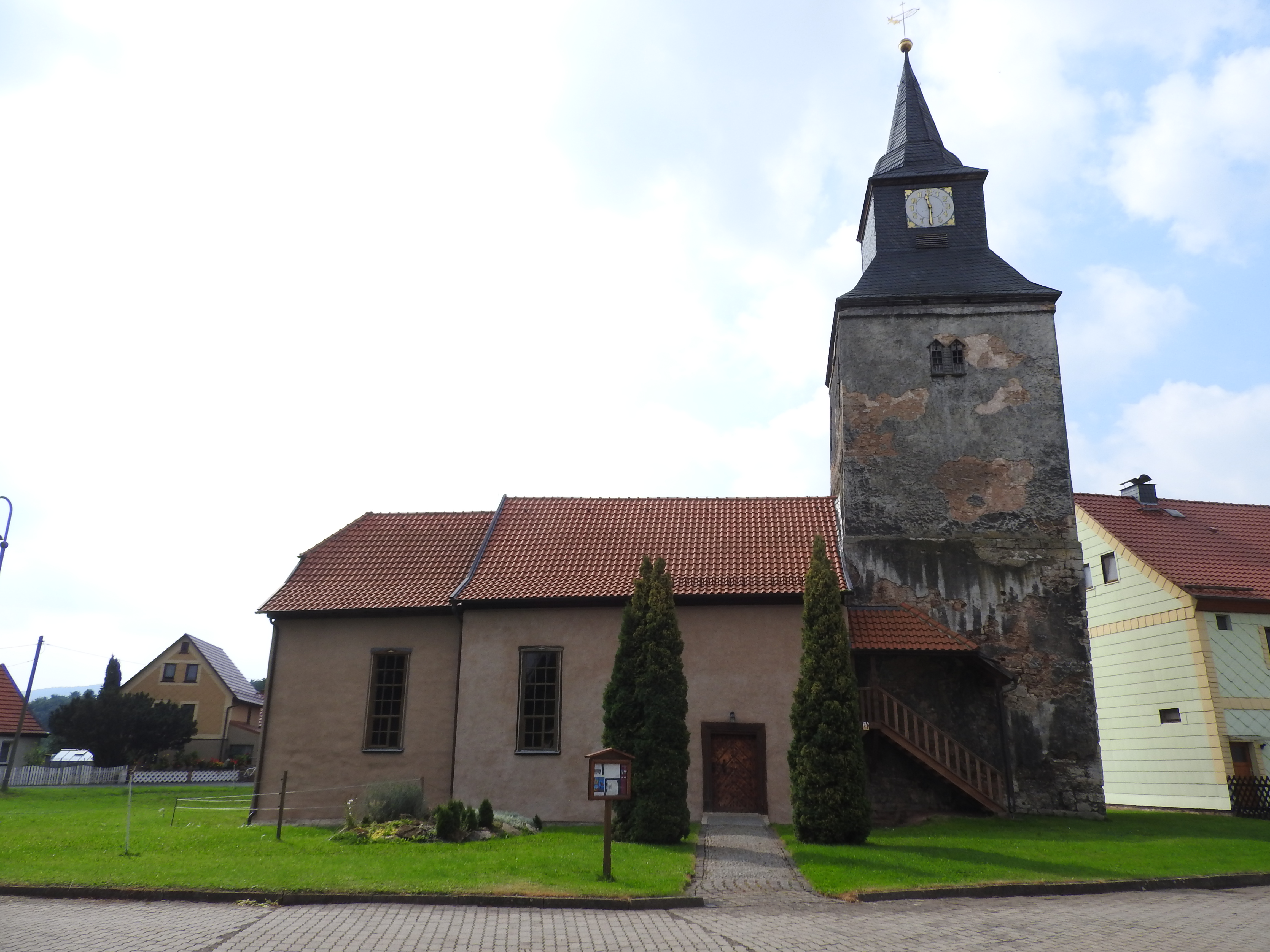 Evangelische Kirche in Kleinbodungen, Thüringen